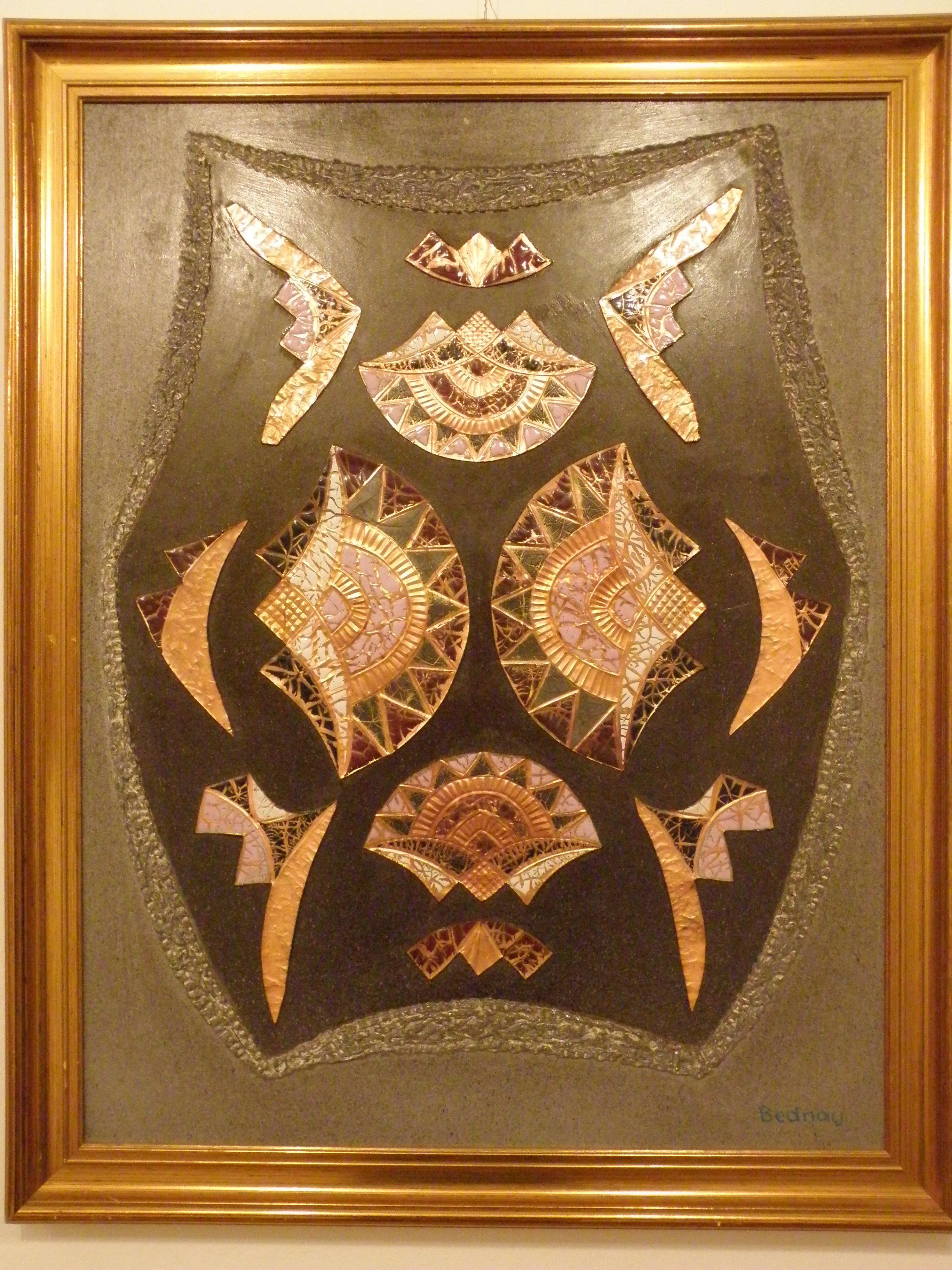 Bednay Dezső: A király ruhája (vegyes technika, festett alapon tűzzománc lemezek)